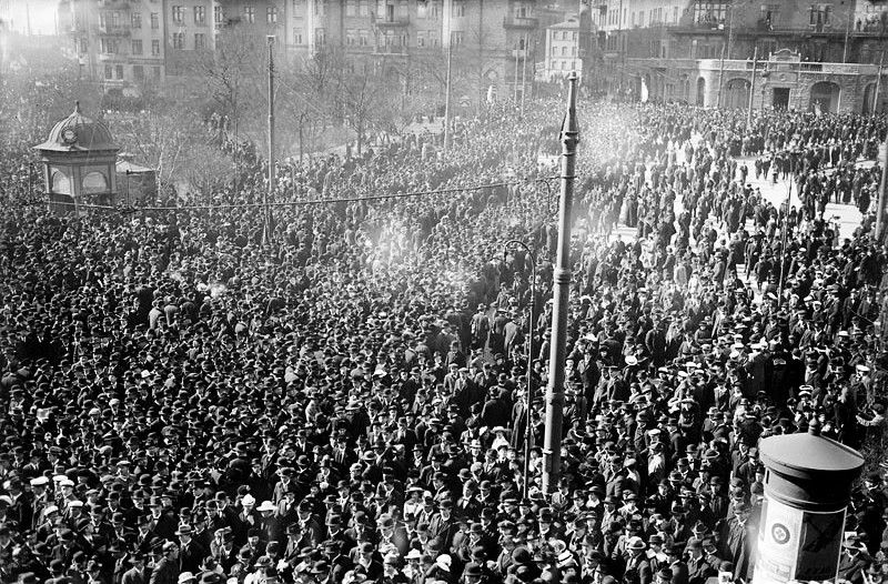 Norra Bantorget, vy mot kvarteren Läraren och Skolan. Stor folksamling vid första maj 1917.